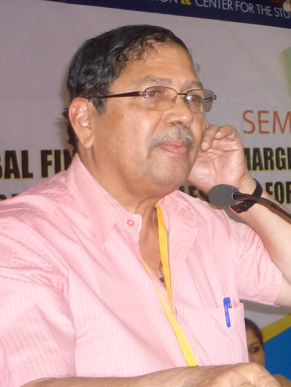 മുൻ സുപ്രീം കോടതി ജഡ്ജിയും ഭാരതത്തിന്റെ മുൻ സോളിസിറ്റർ ജനറലുമാണ് എൻ. സന്തോഷ് ഹെഗ്ഡെ.